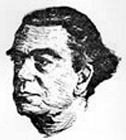 O anarquista José Oiticica, já com alguma idade.